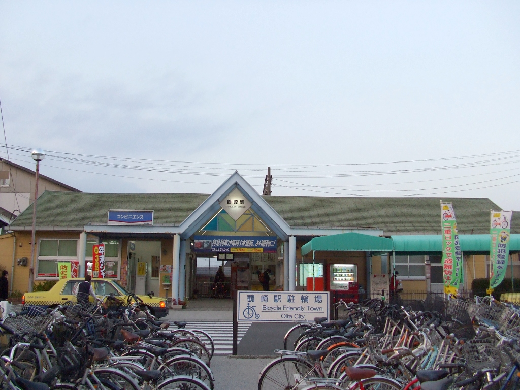 駅舎